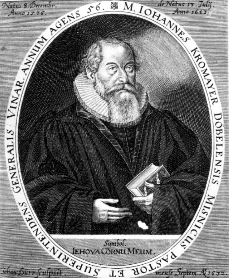 Johann Kromayer (1576-1643) deutscher lutherische Theologe